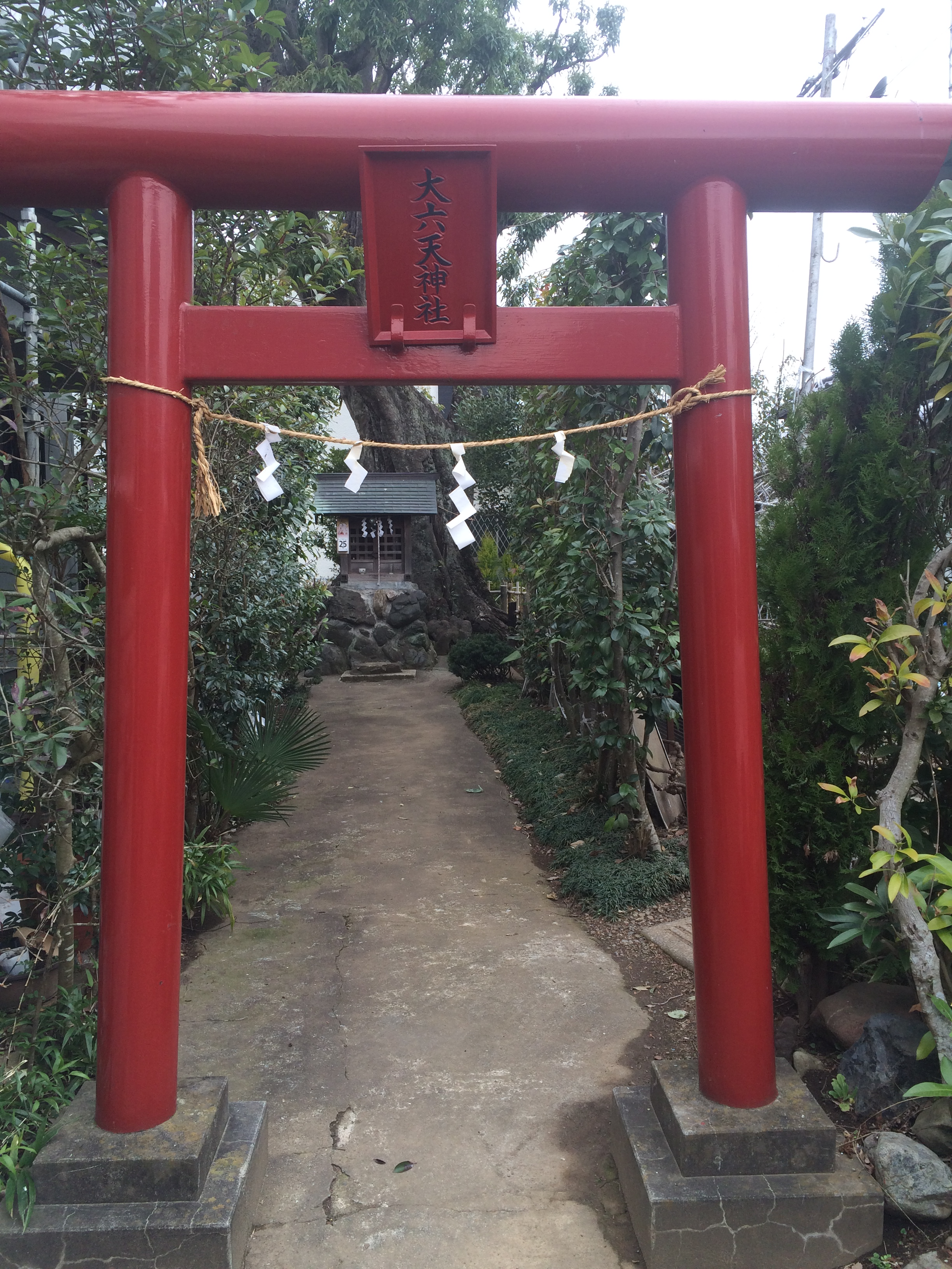 埼玉県飯能市にある大六天神社の鳥居。